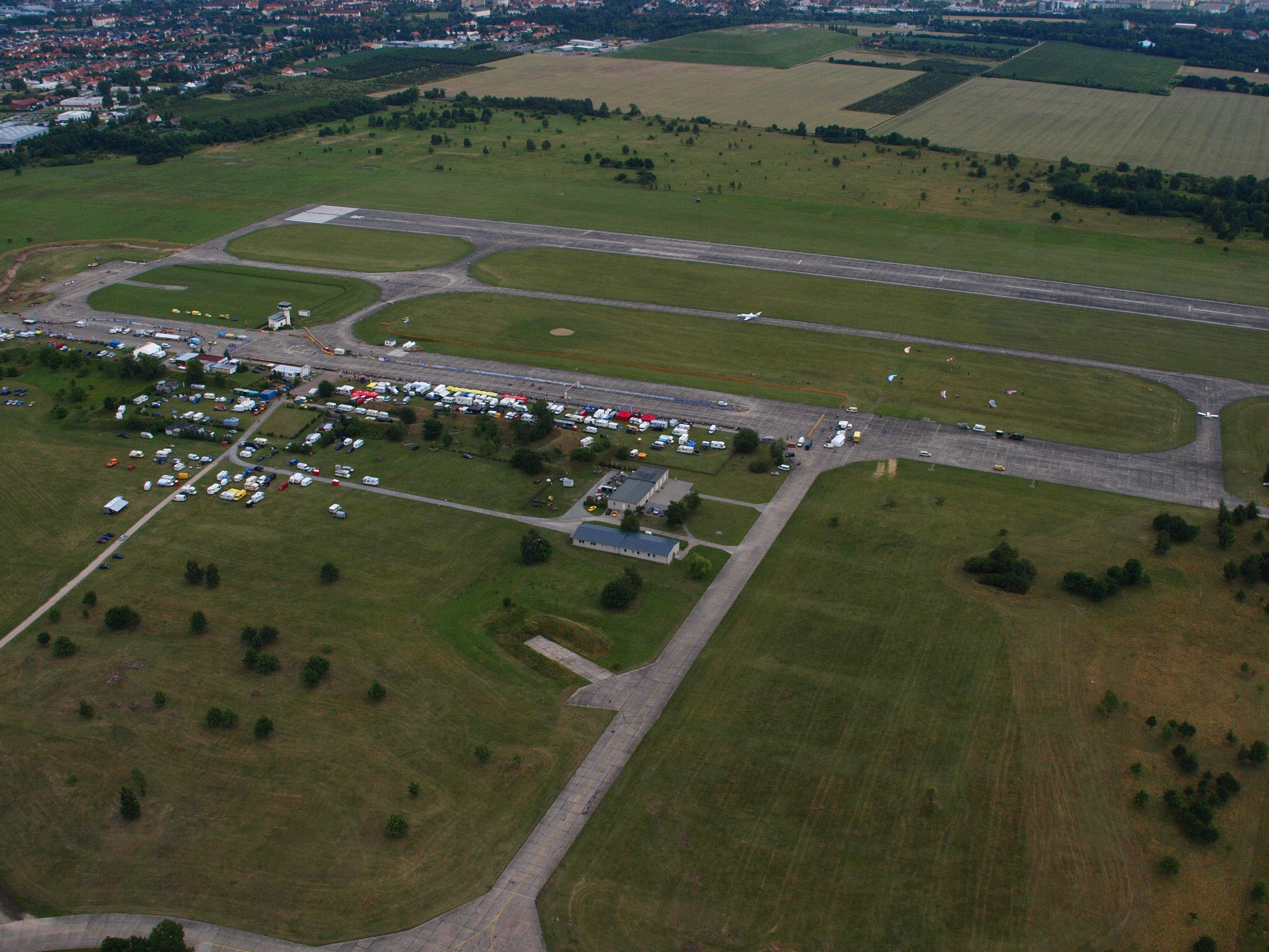 Flugplatz Stendal-Borstel: Luftaufnahme